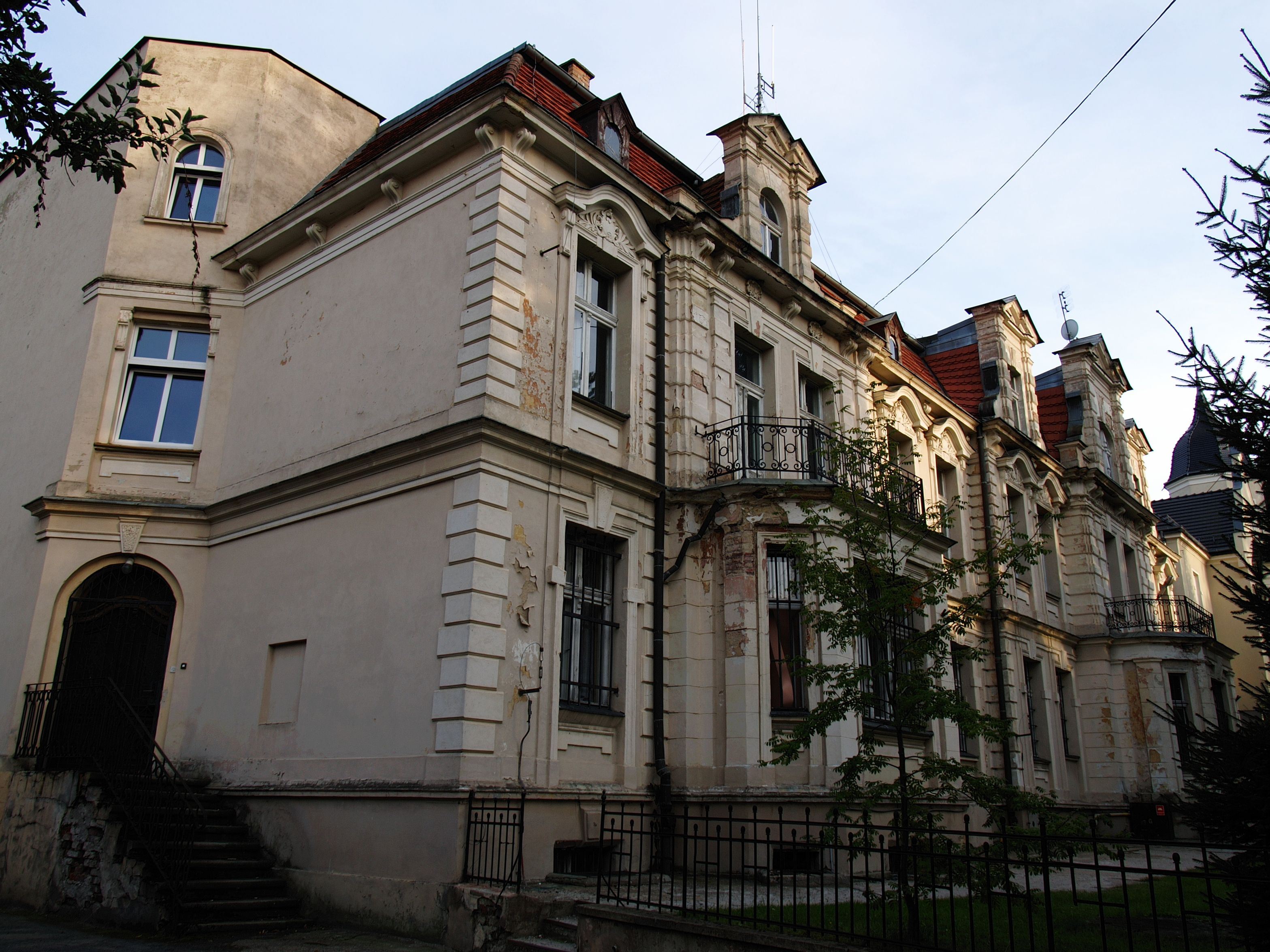 1Trzebnica, ul. ks. Bochenka 8 - budynek Komendy Rejonowej Policji (zabytek nr A/3860/674/W)